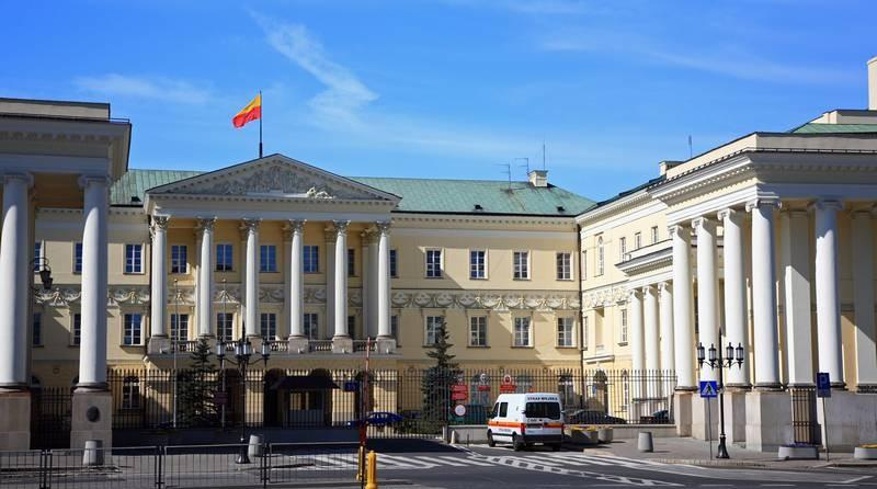 Warszawa (Polska)